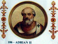 Pope Adrian II